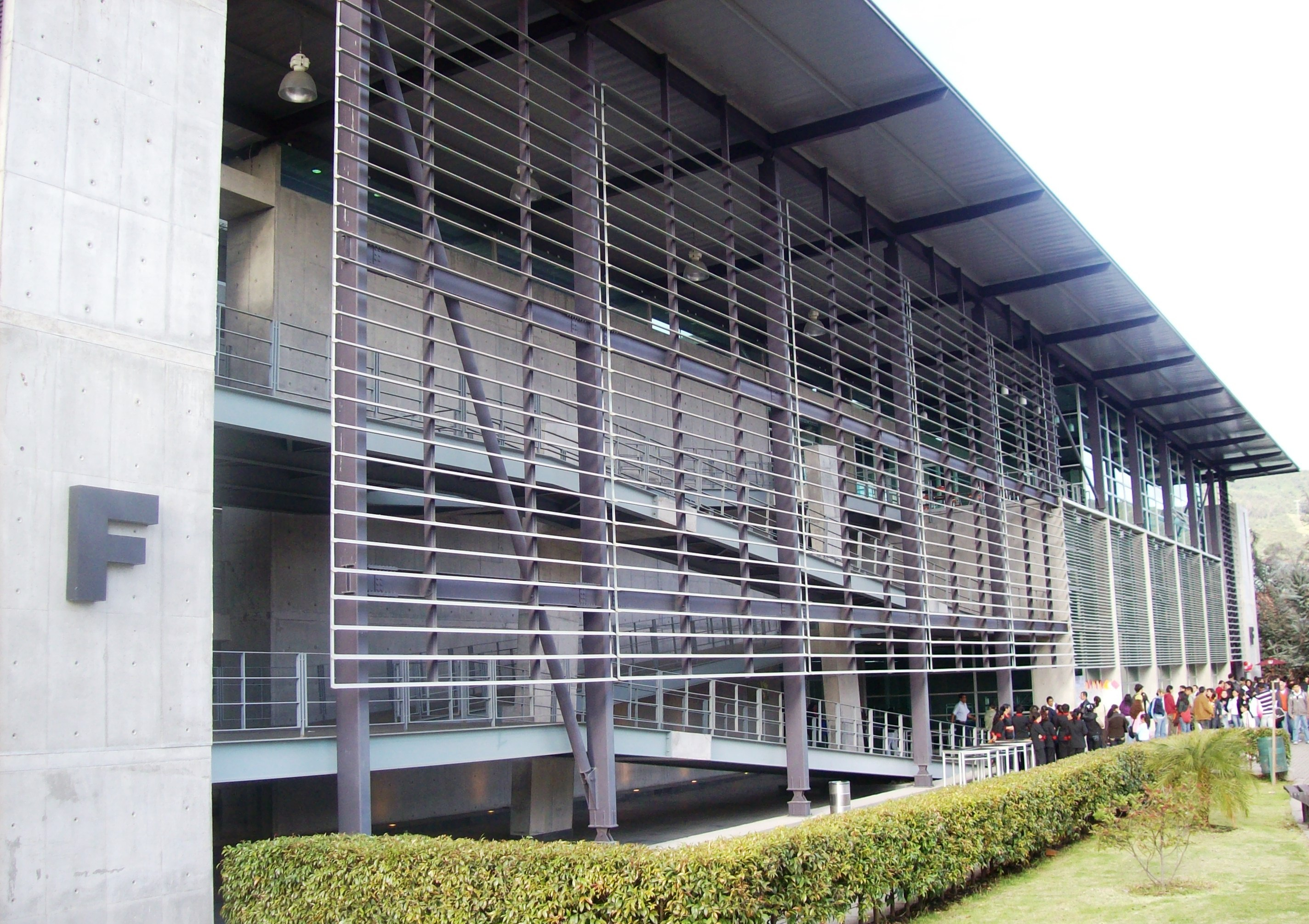 Vista del bloque F de la Escuela Colombiana de Ingeniería Julio Garavito